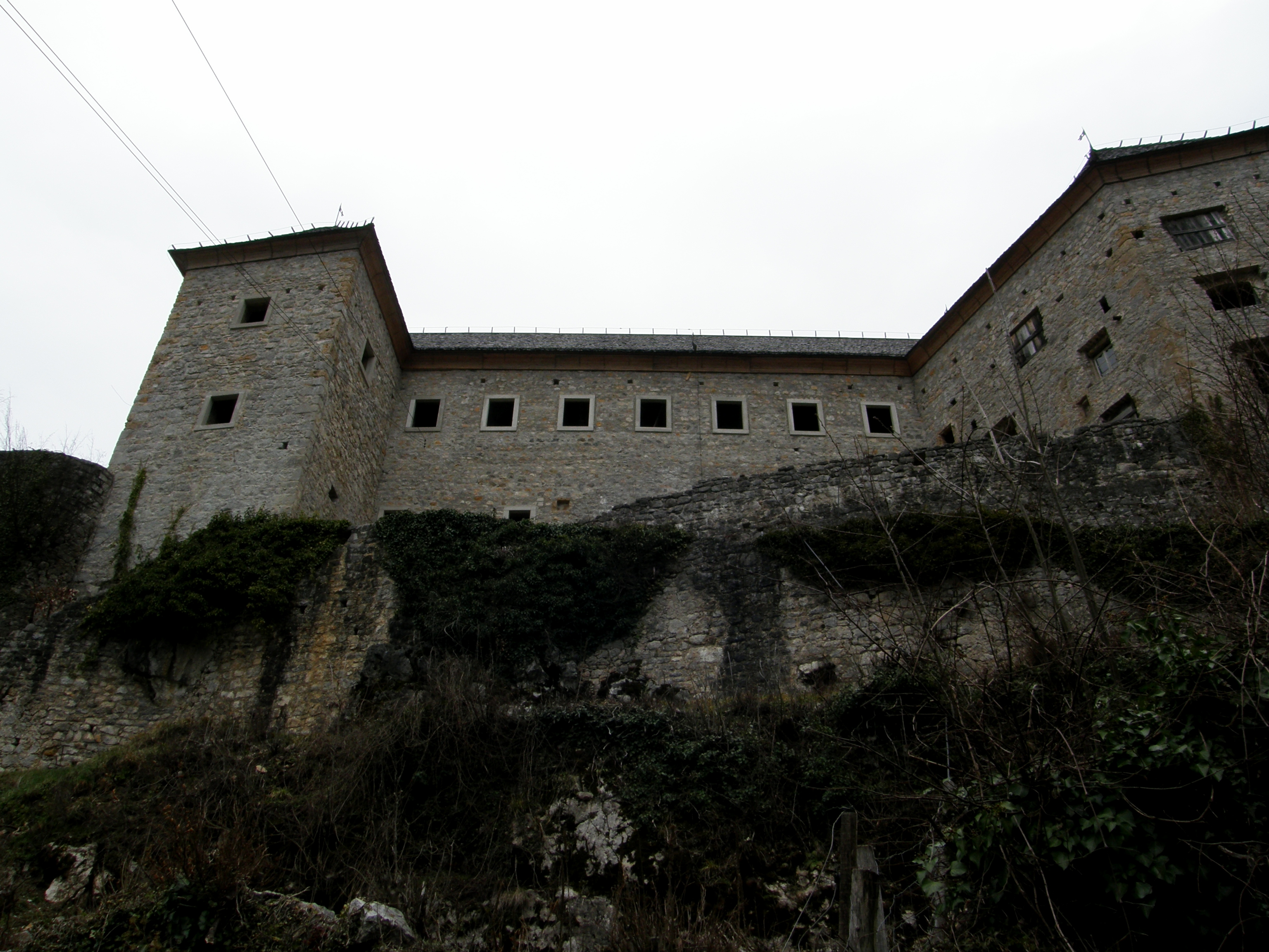 Kastel castle in Slovenia